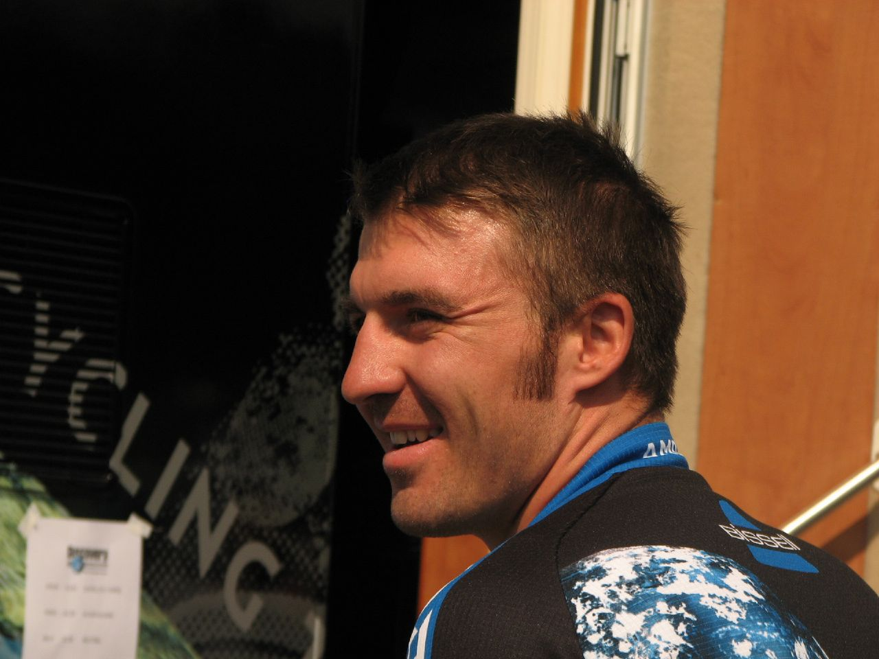 Jaroslav Popovitsj (Yaroslav Popovych)